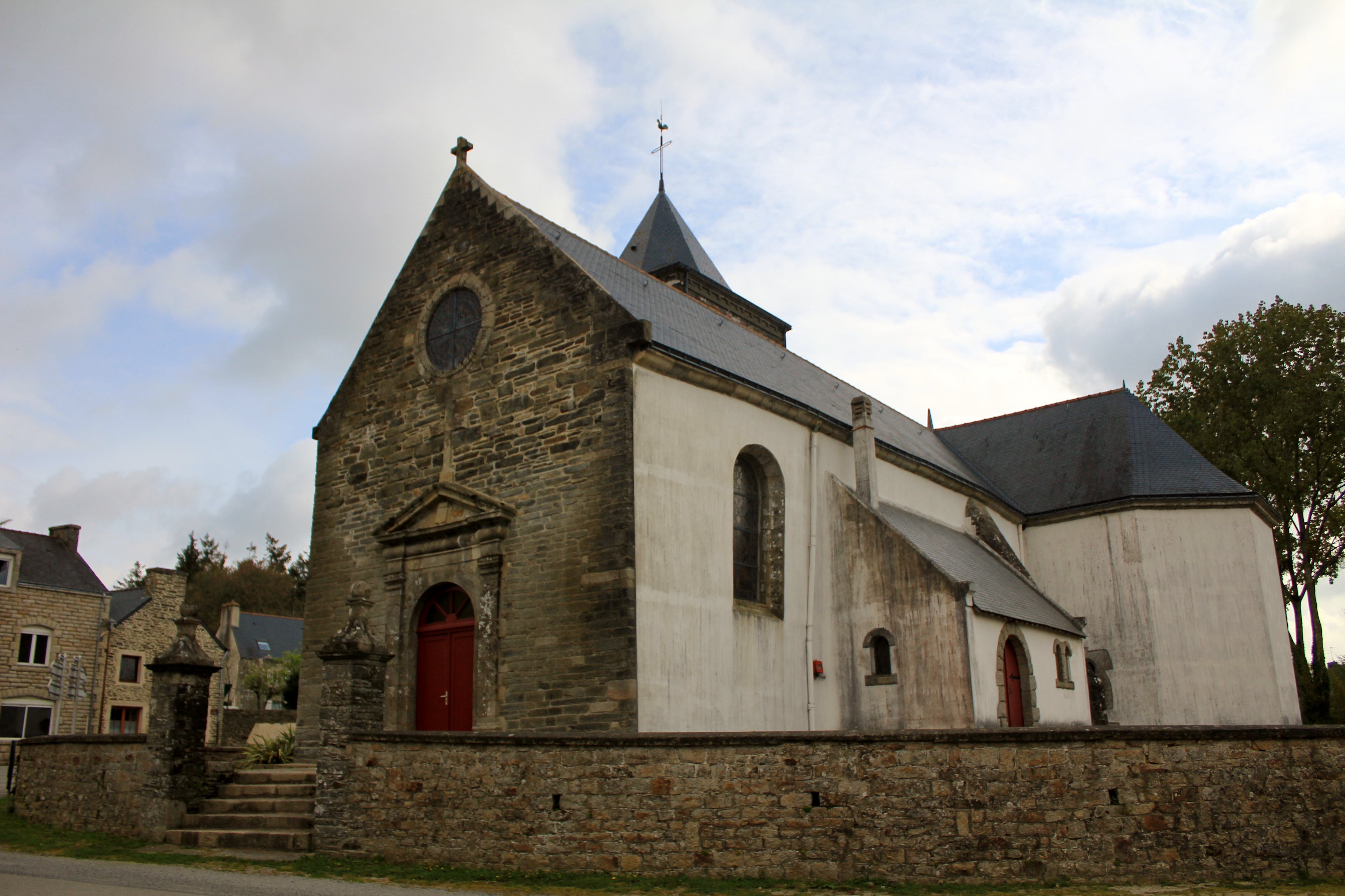 Eglise Sainte-Julitte à Remungol